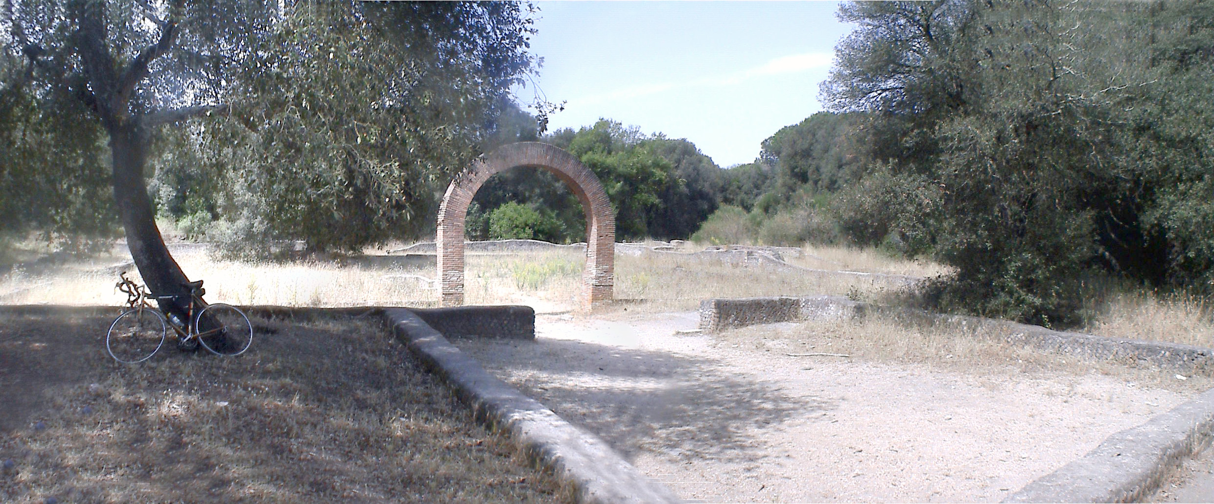 VILLA DI PLINIO IL GIOVANE